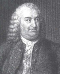 Die Abbildung stammt von und ist als "Public Domain" lizensiert, da das Copyright abgelaufen ist.